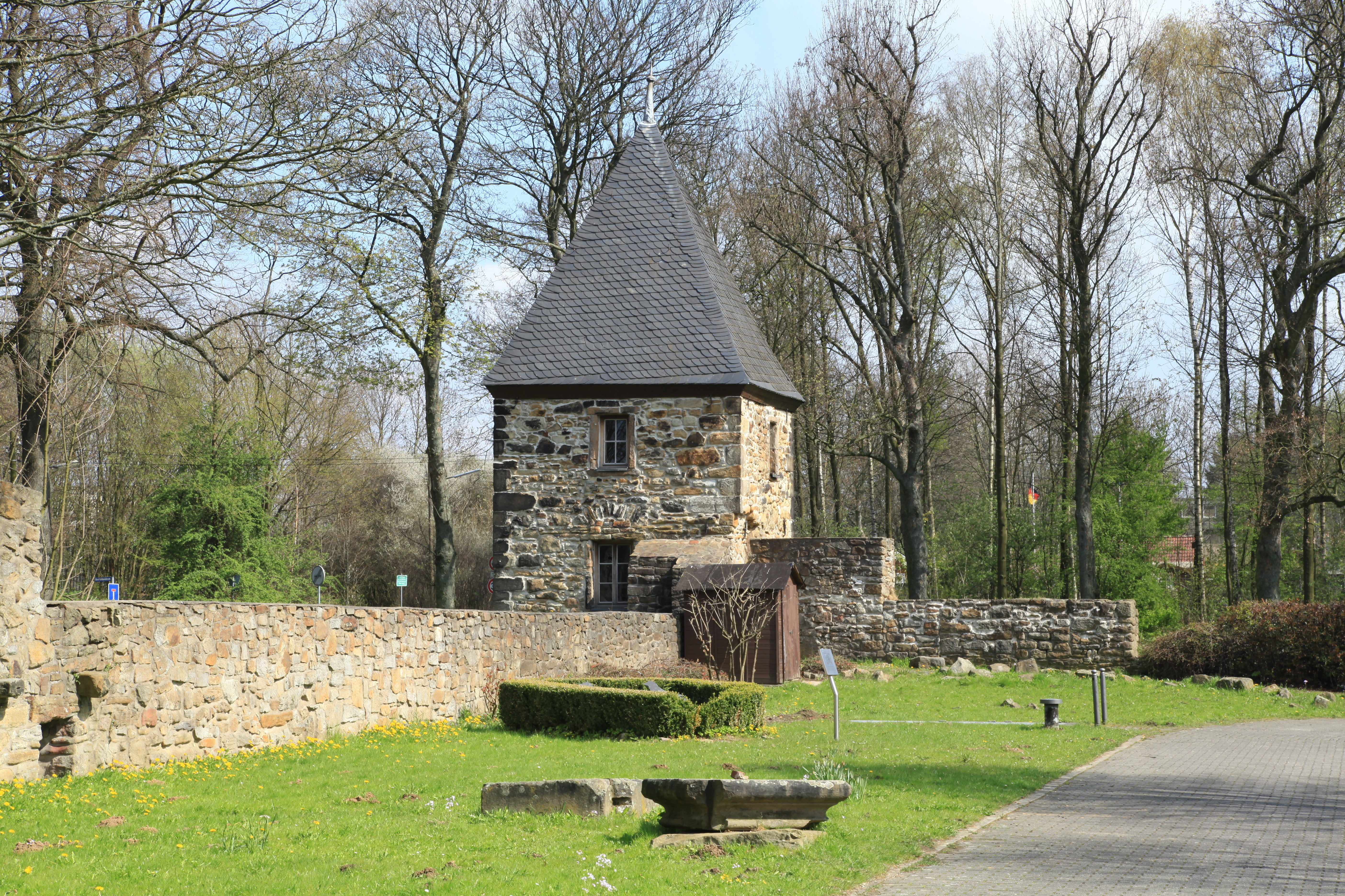 Gefängnisturm von Haus Langendreer, Am Leithenhaus in Bochum-Langendreer